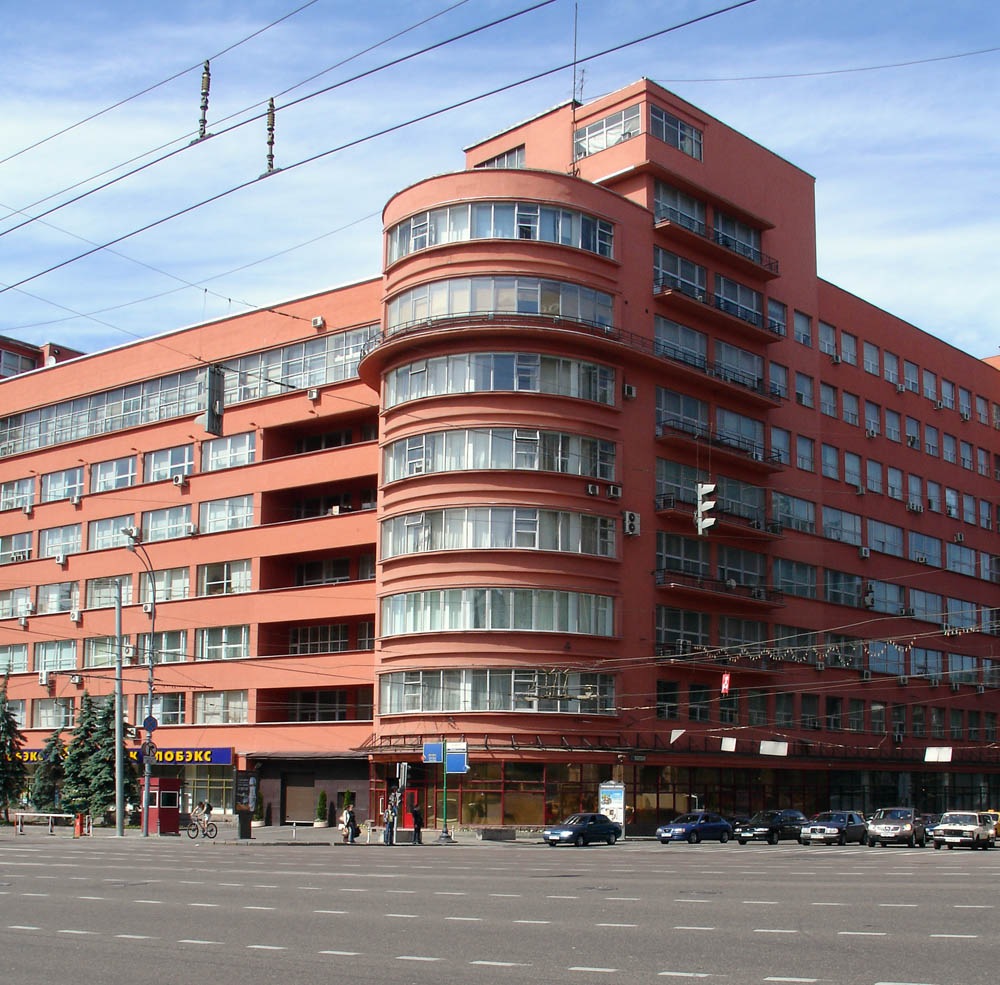 Moscow, Narkomzem Bldg by Alexey_Shchusev RUSSIAN: Москва. Здание Наркомзема на Садово-Спасской, А. В. Щусев